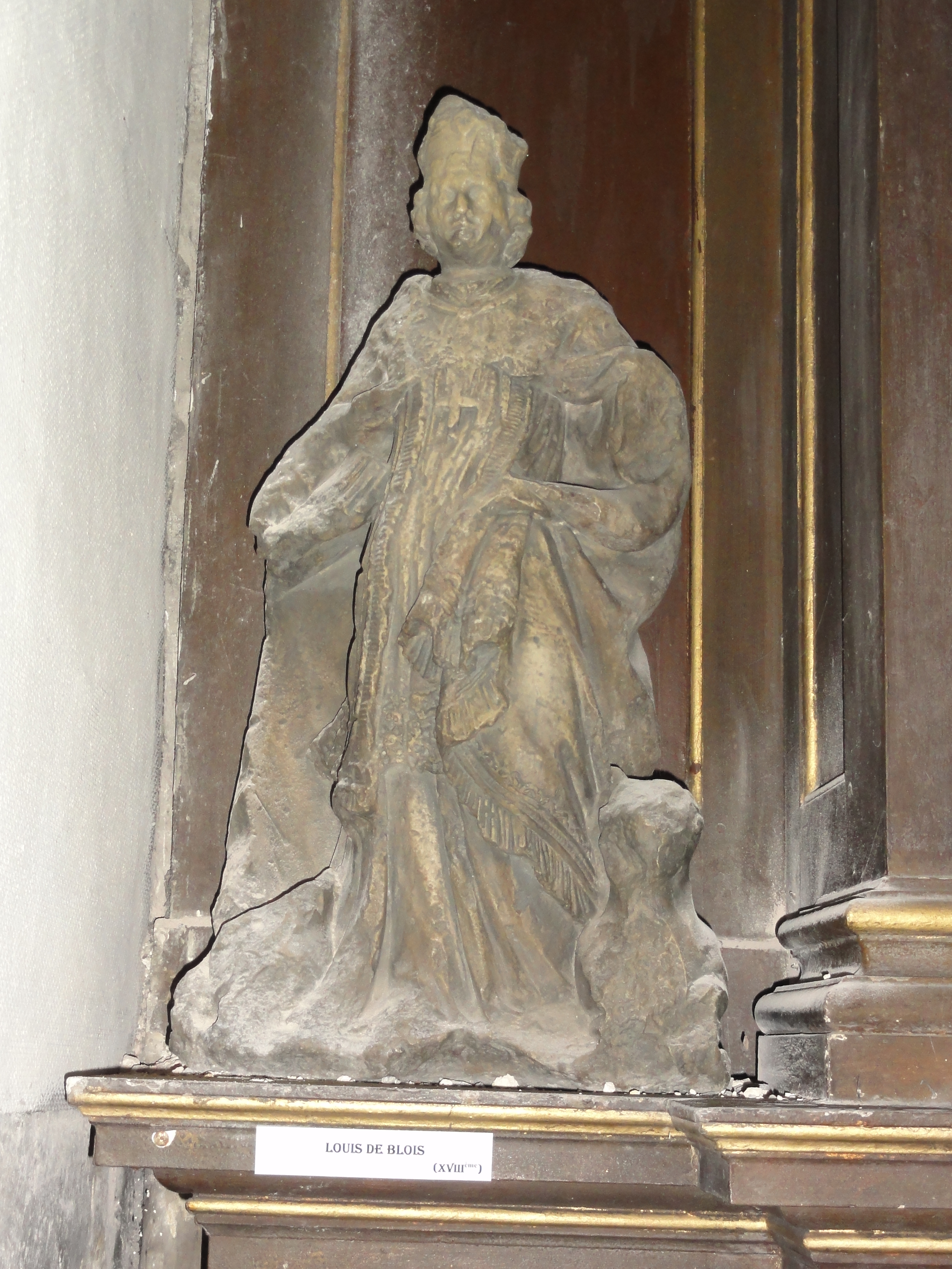 Liessies (Nord, Fr) église, statue Louis de Blois